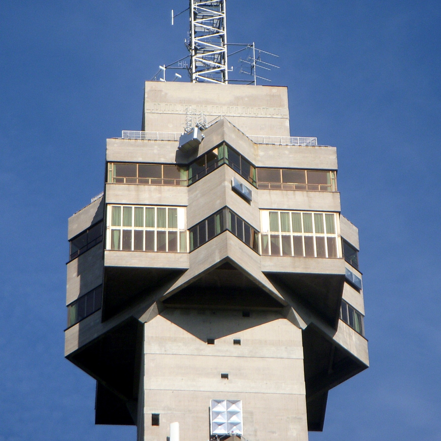 Kaknästornet i Stockholm, restaurant- och utsiktsplattform